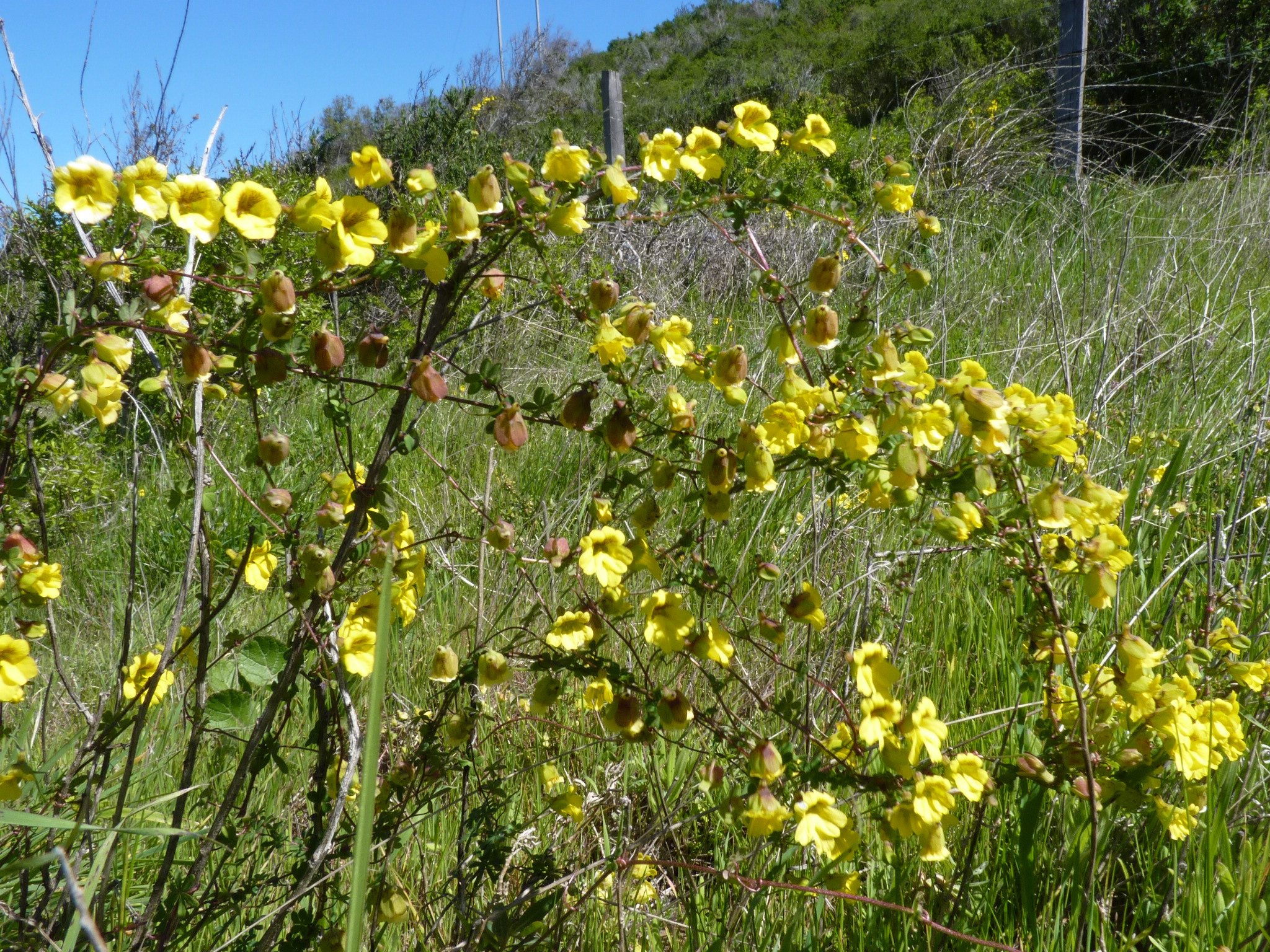 Tropaeolum brachyceras, Flora de la zona de Los Vilos, Chile